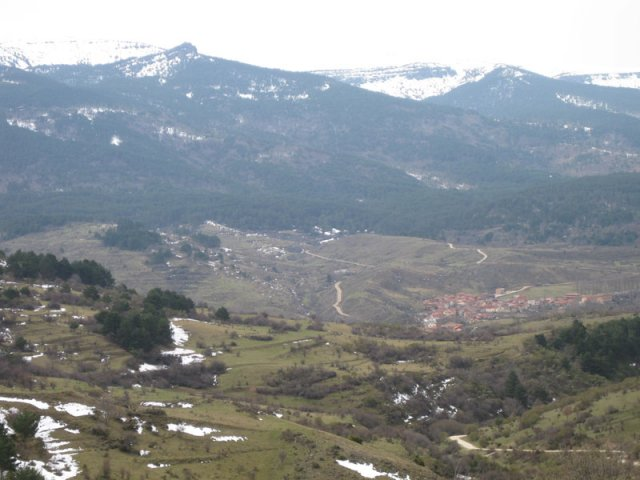 Neila desde Riofrío